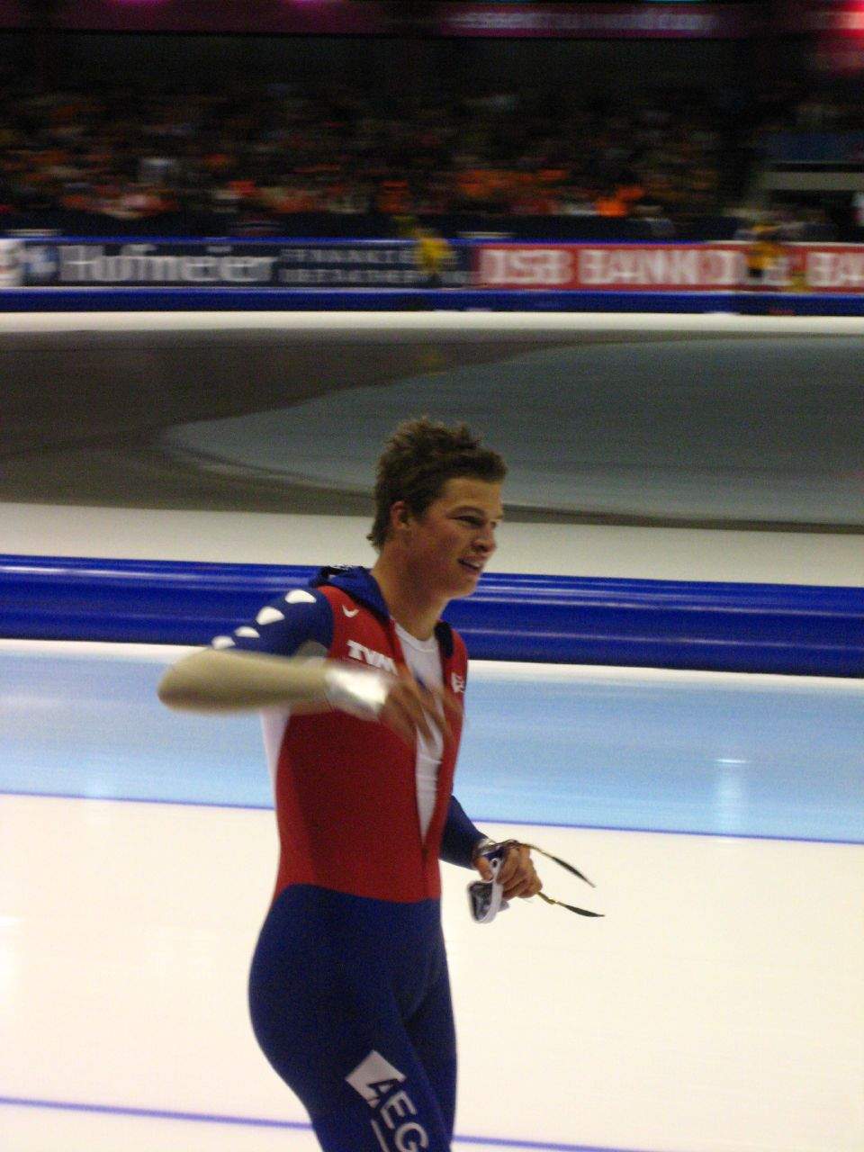 Sven Kramer just won the 1500